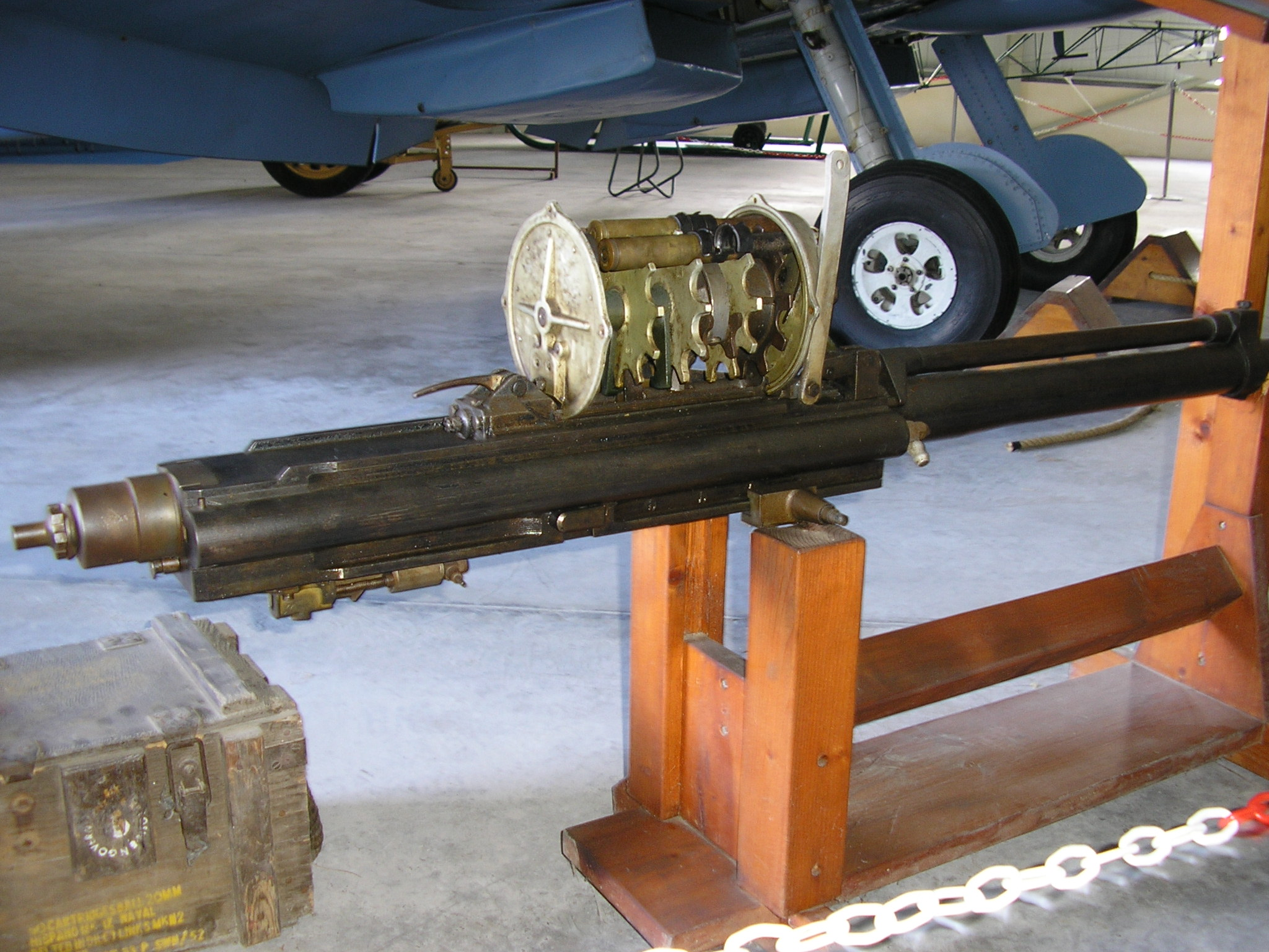 Hispano-Suiza-HS.404-Mk.II-20-mm-Maschinenkanone im Malta Aviation Museum. Aus dem Mittelmeer geborgene und restaurierte Waffe einer Spitfire